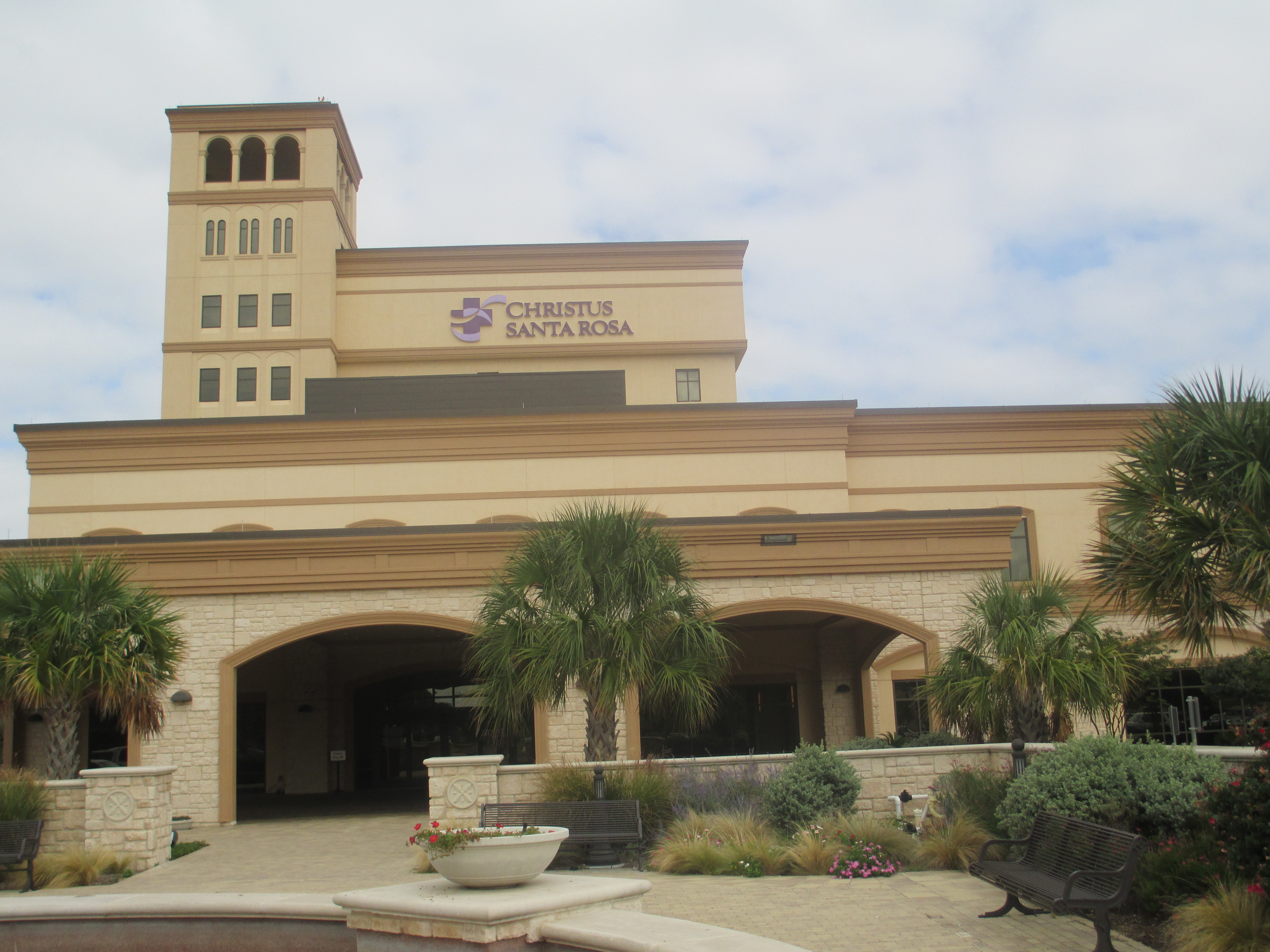 Christus Santa Rosa Hospital, San Antonio, TX